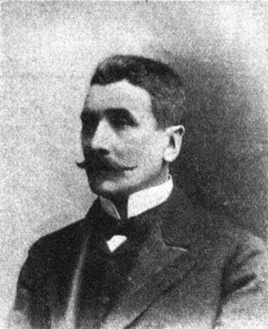 Österreichischer Politiker, Reichsratswahl 1907, Name siehe Dateiname